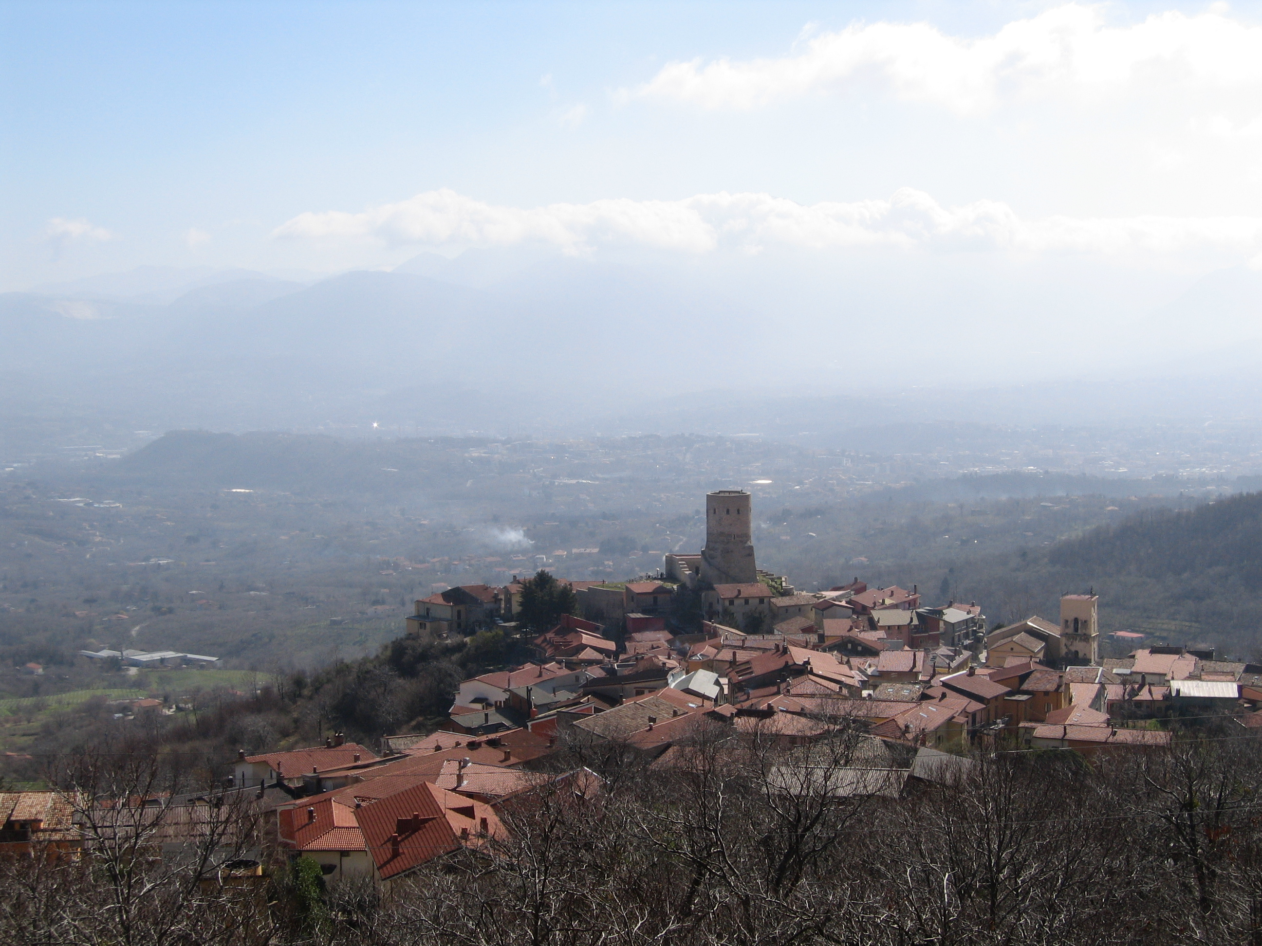 Francesco Matarazzo, GFDL, Panorama del borgo medievale di Summonte (AV)